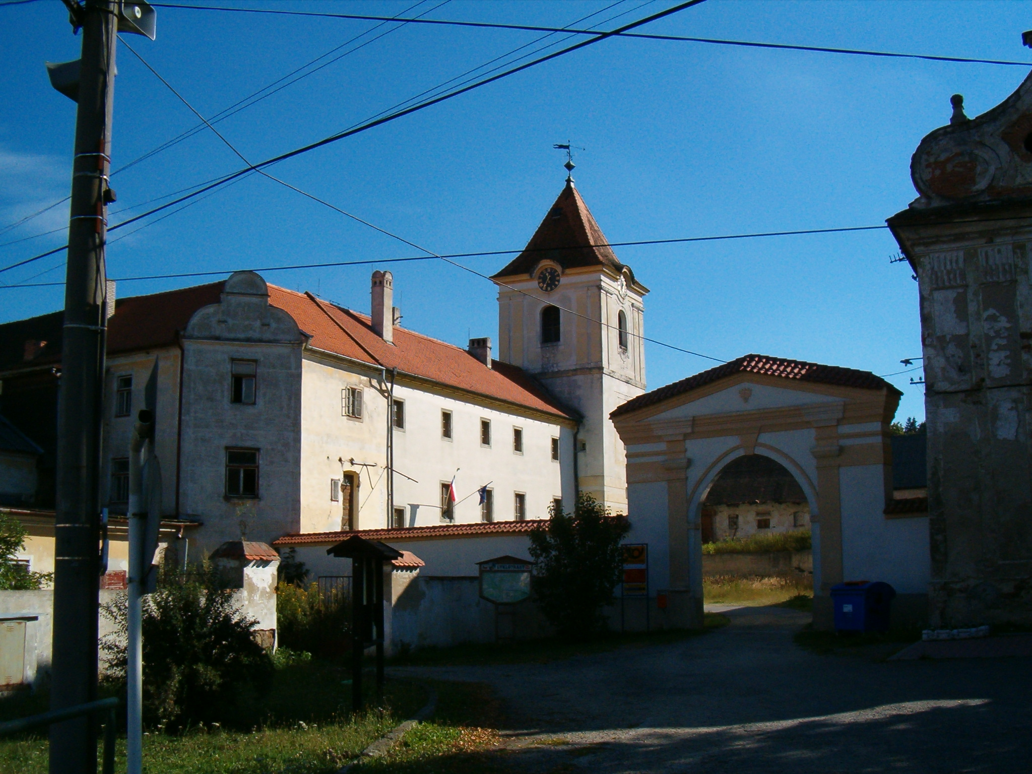 Zámek v Písečném